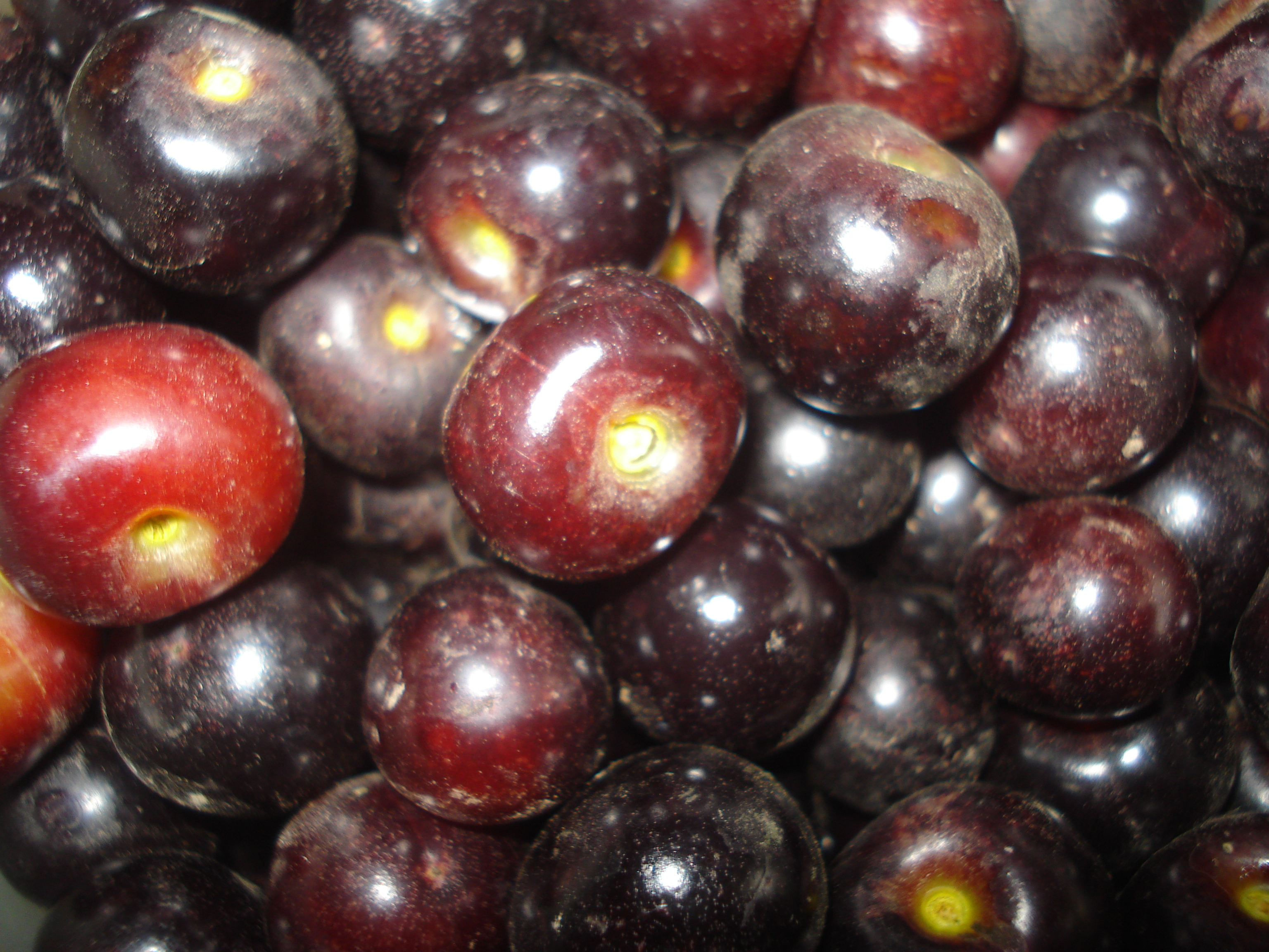 Frutos del árbol de capulí. (Prunus salicifolia)